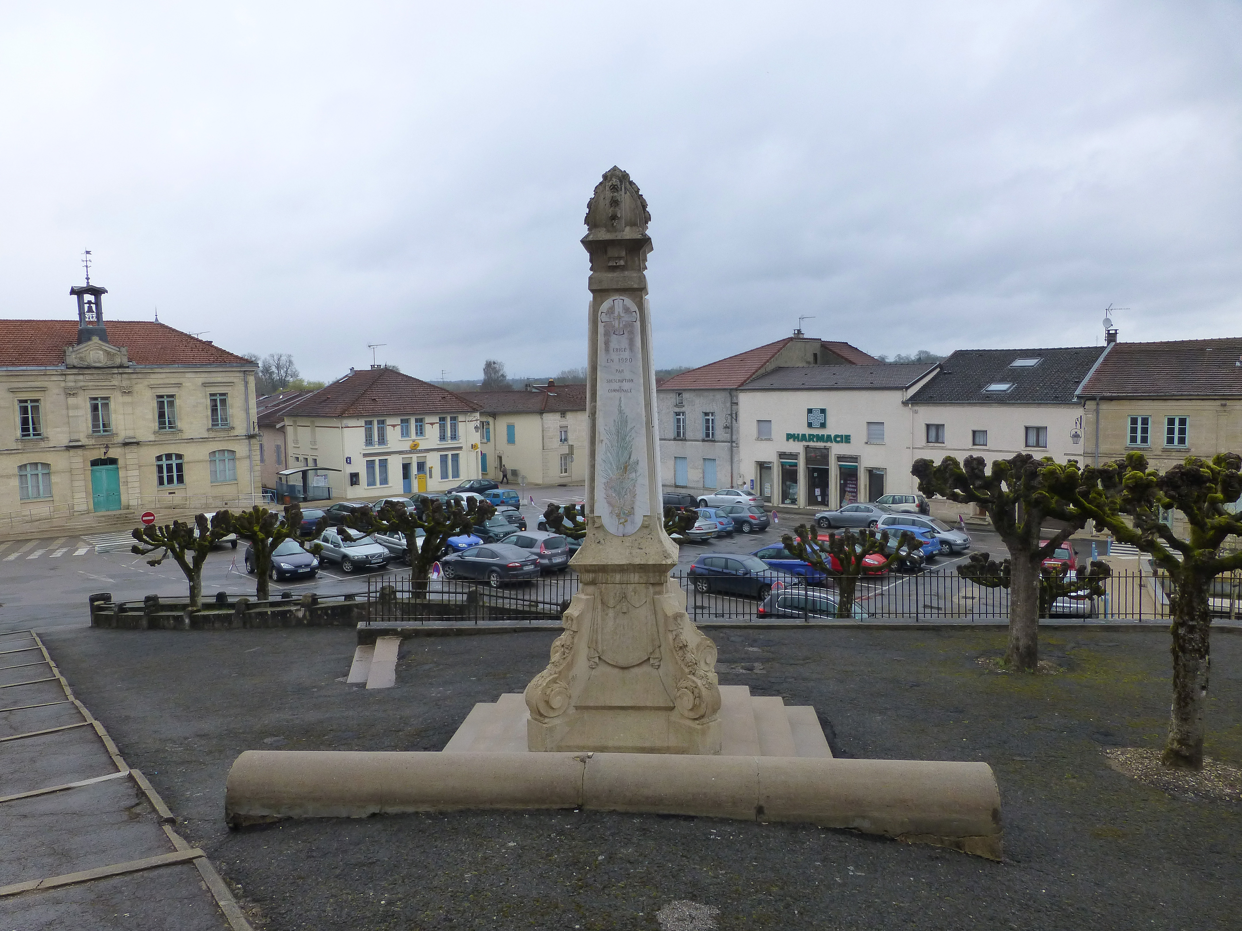 Place de la Mairie à Fains-les-Sources (Fains-Véel, Meuse)